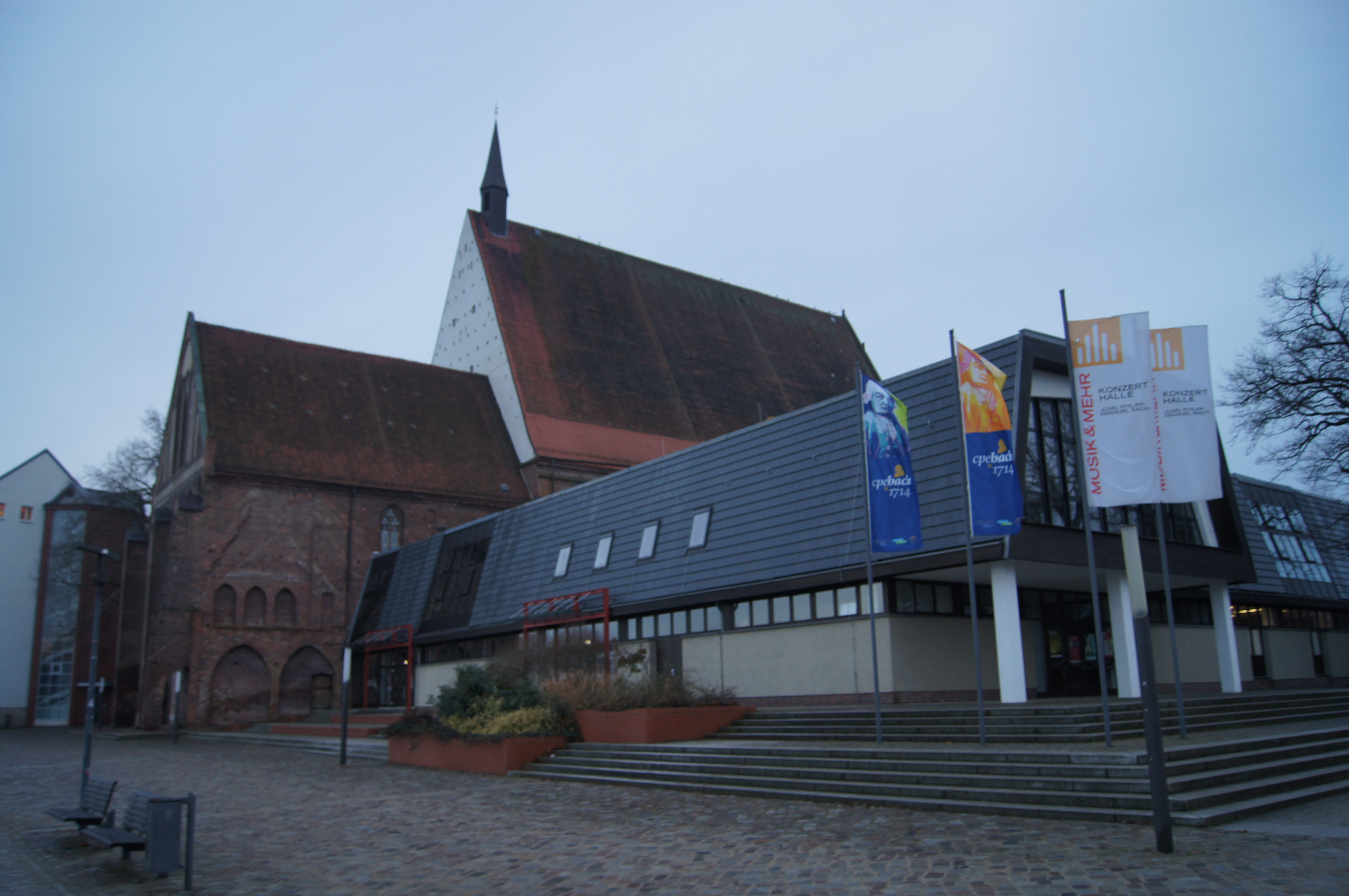 Konzerthalle in Frankfurt (Oder), Brandenburg, Deutschland